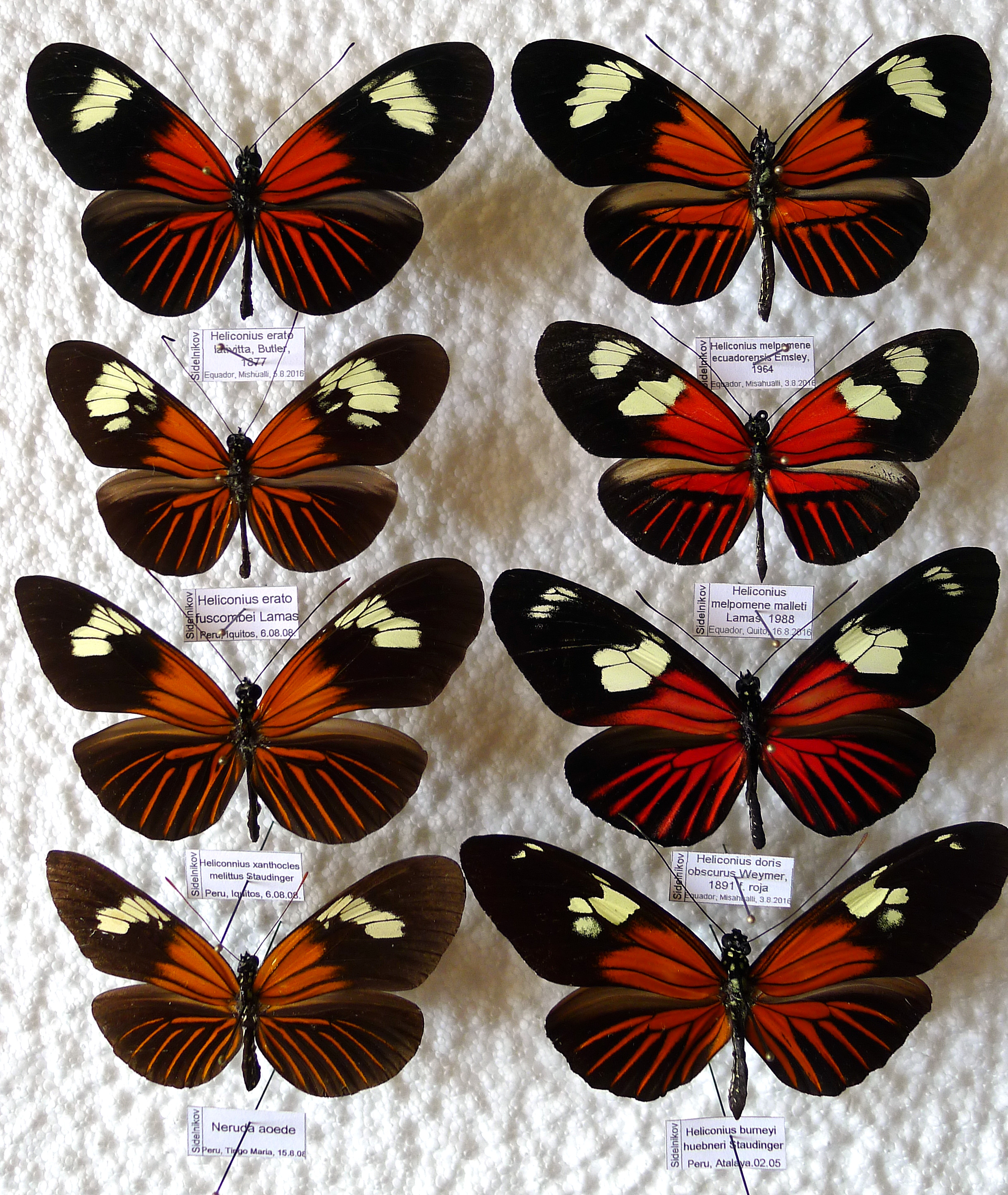 Müllerian mimicry